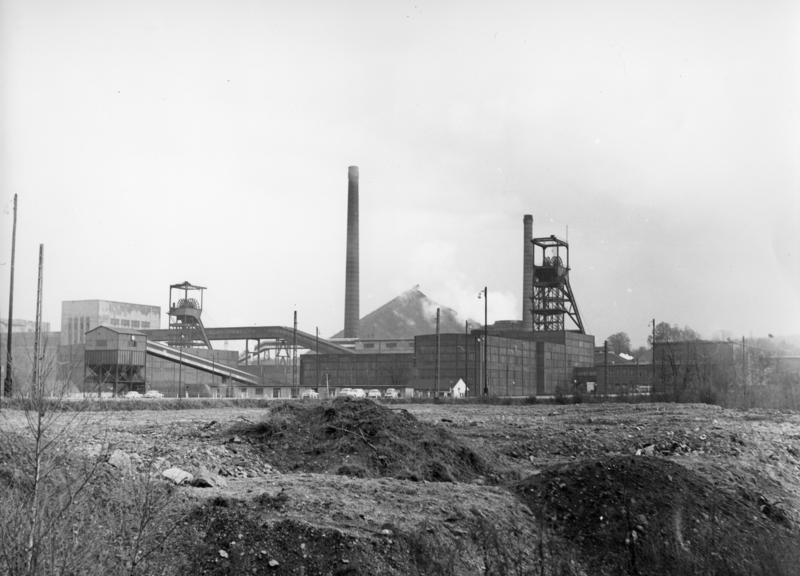 Zeche Reden, Landsweiler-Reden (Saar)